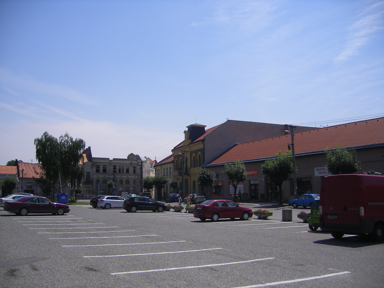 Ipolyság - Fő tér